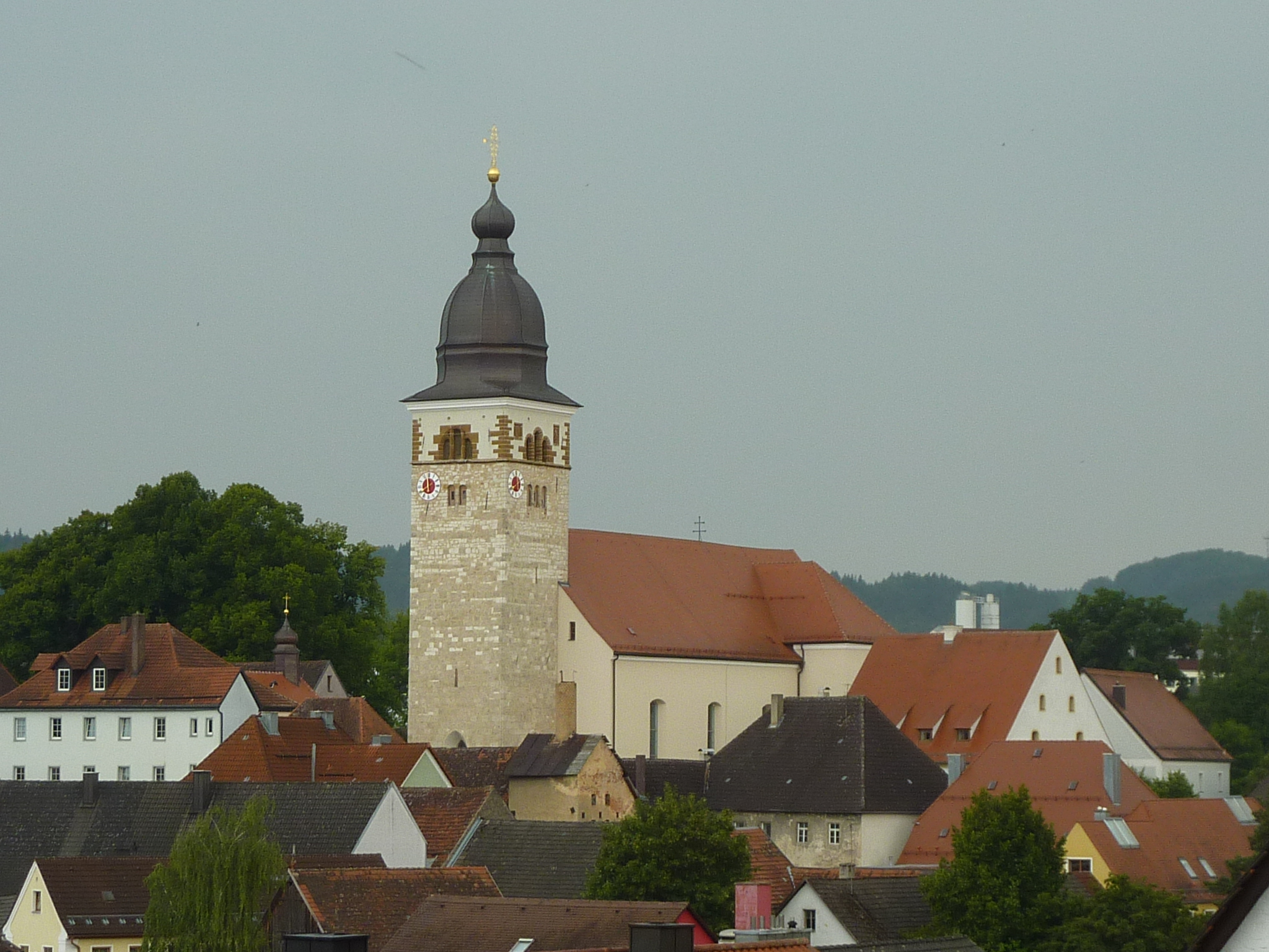 Katholische Pfarrkirche St. Michael in LauterhofenThis is a photograph of an architectural monument.